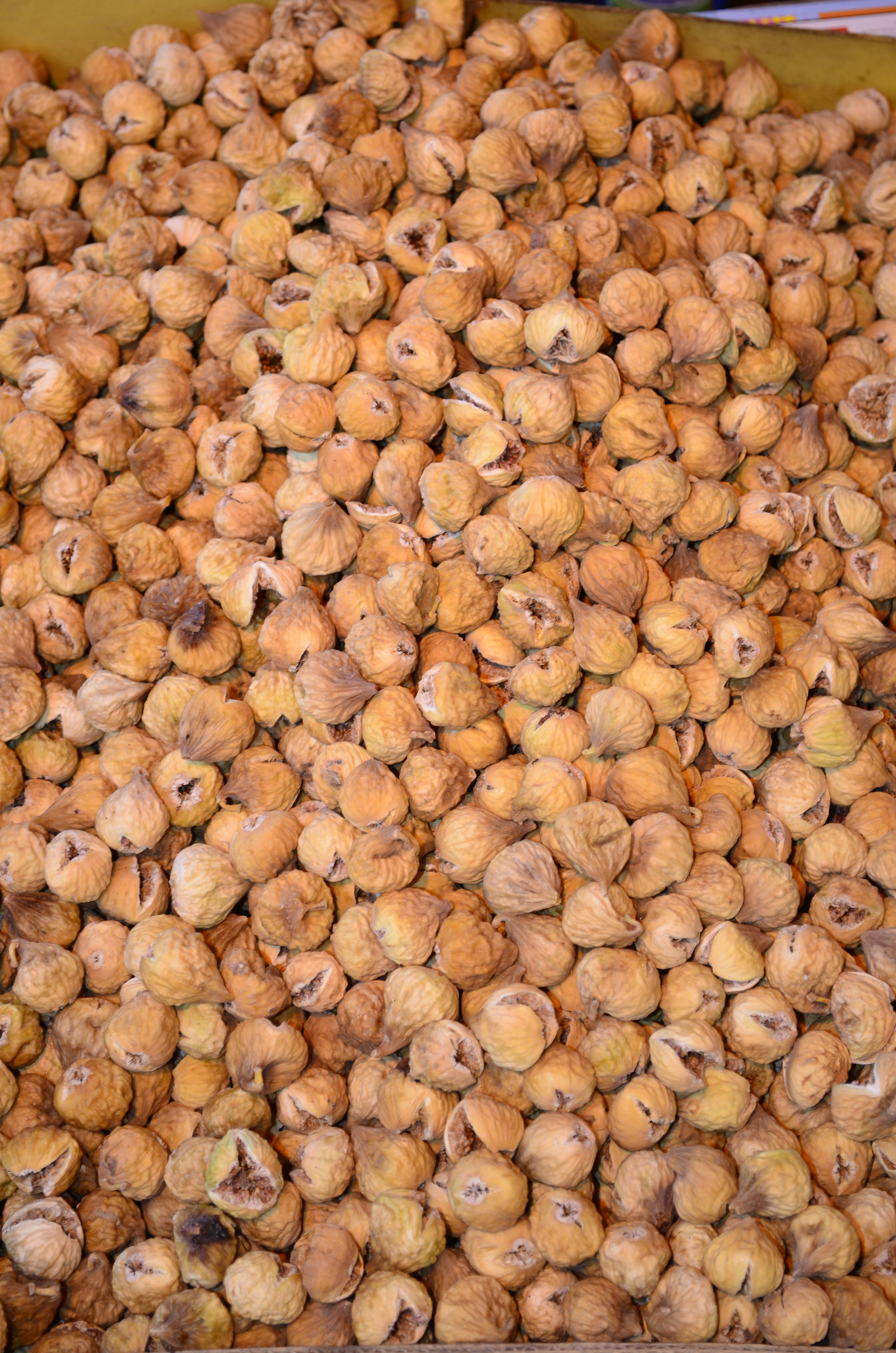 انجیر خشک